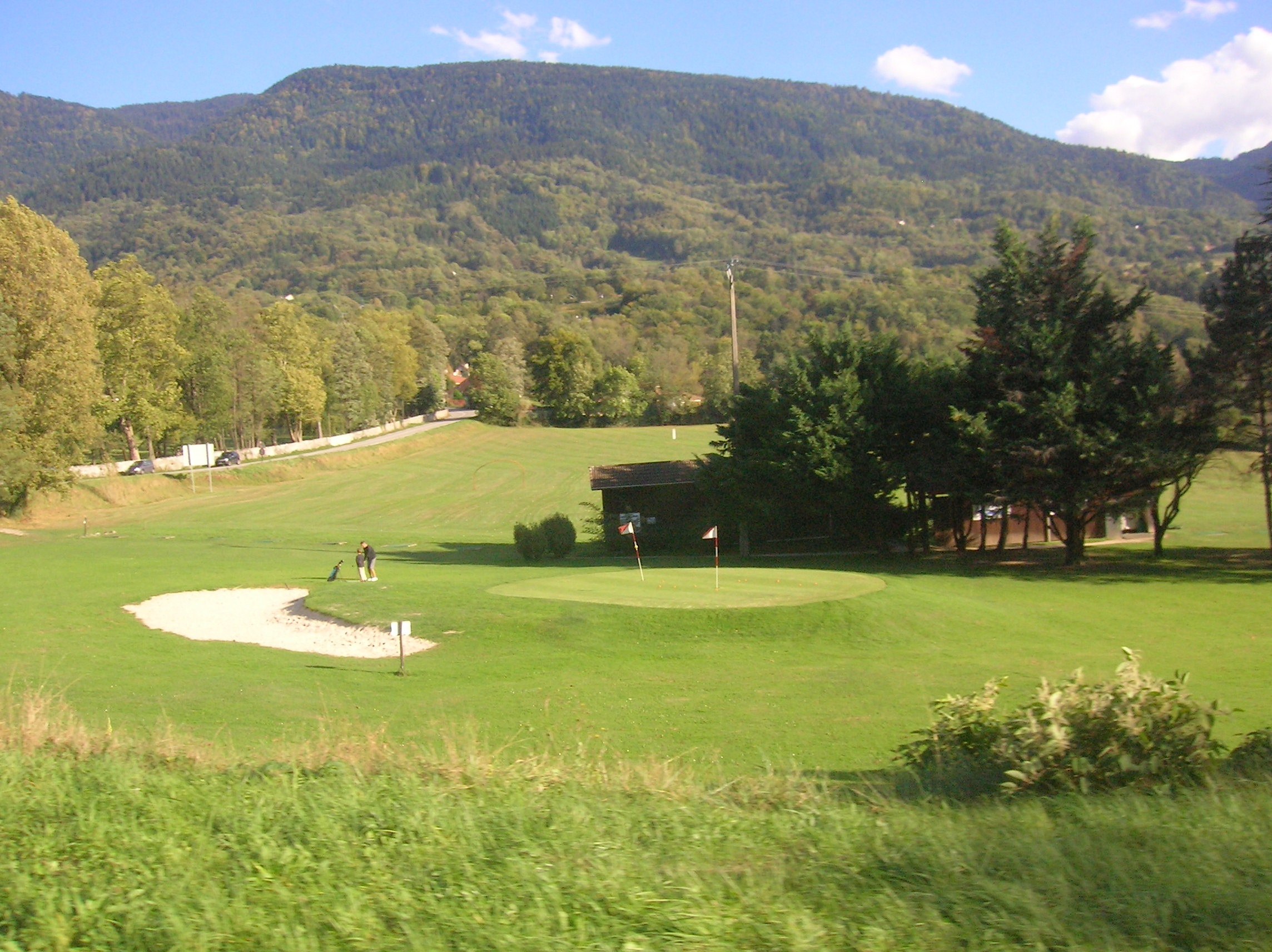 golf. Vaulnaveys-le-Haut, Isère, France.